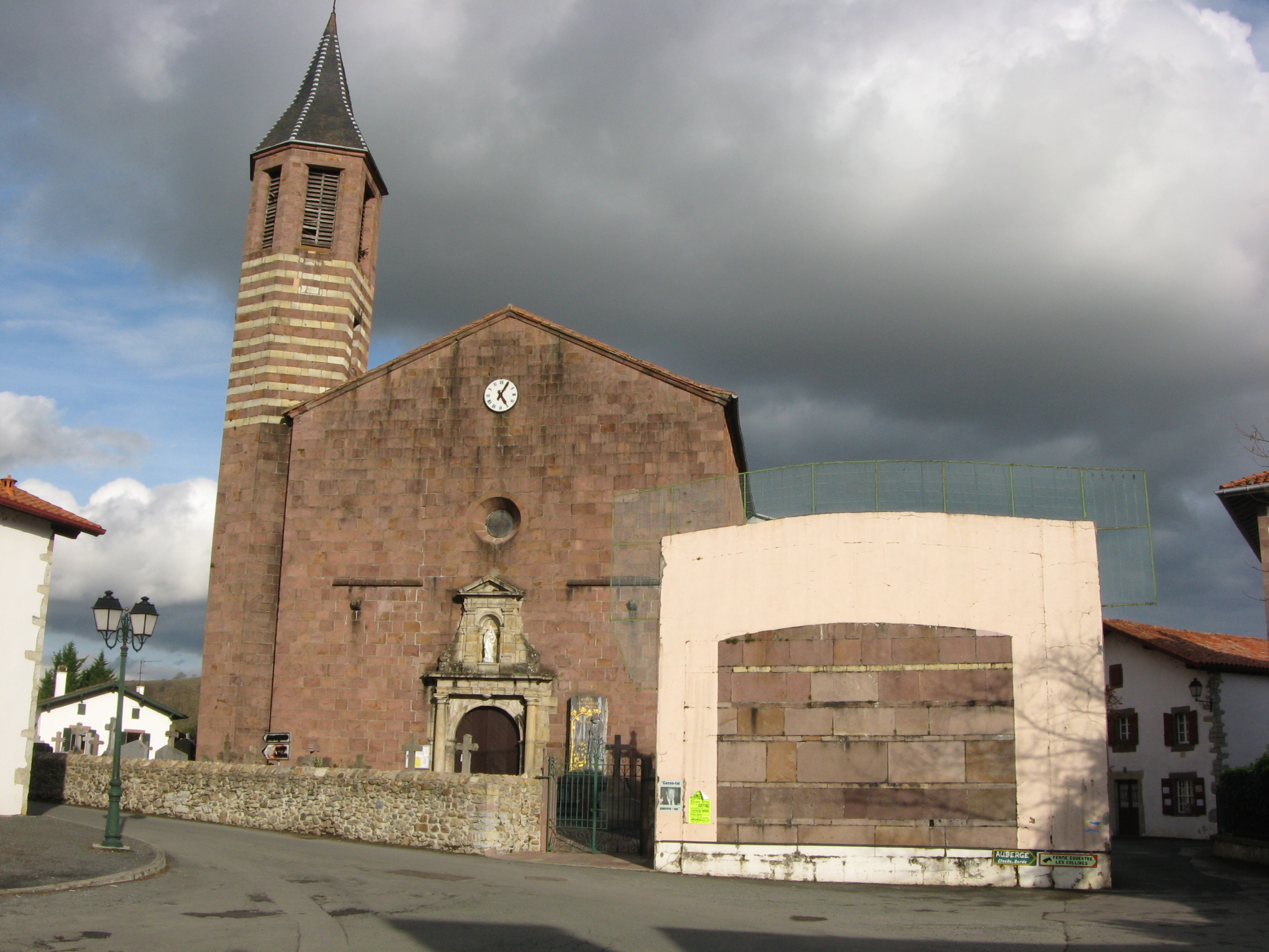 Osses clocher de l'église (Basse-Navarre) (Pyrénées-Atlantiques) (Pyrénées).